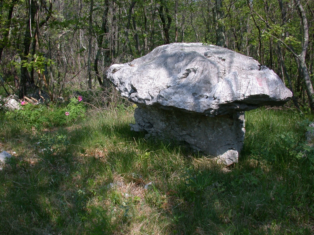 Kamnita goba